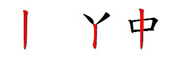 丨部